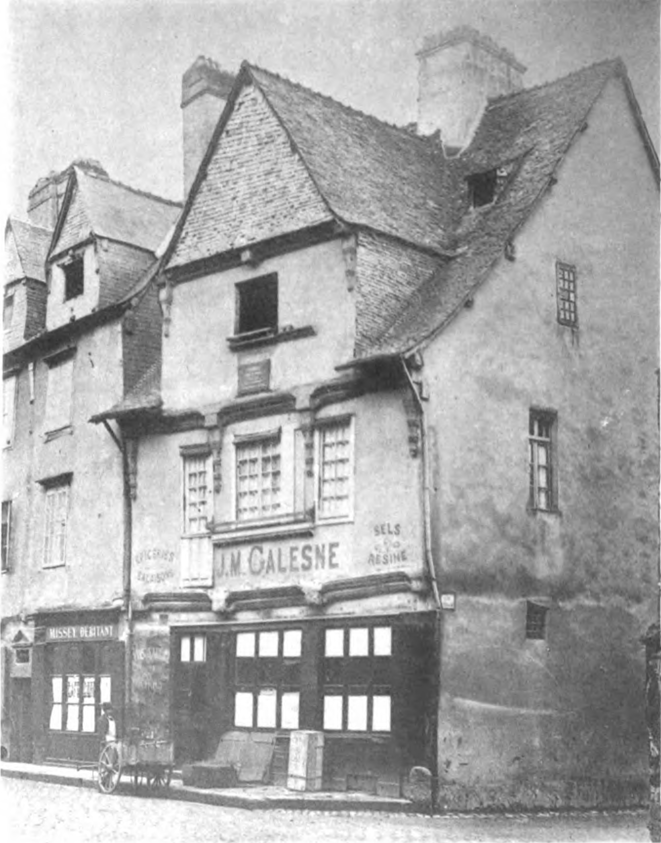 « Maison de Leperdit, contour Saint-Aubin », 19 place Sainte-Anne à Rennes (Ille-et-Vilaine, Bretagne).